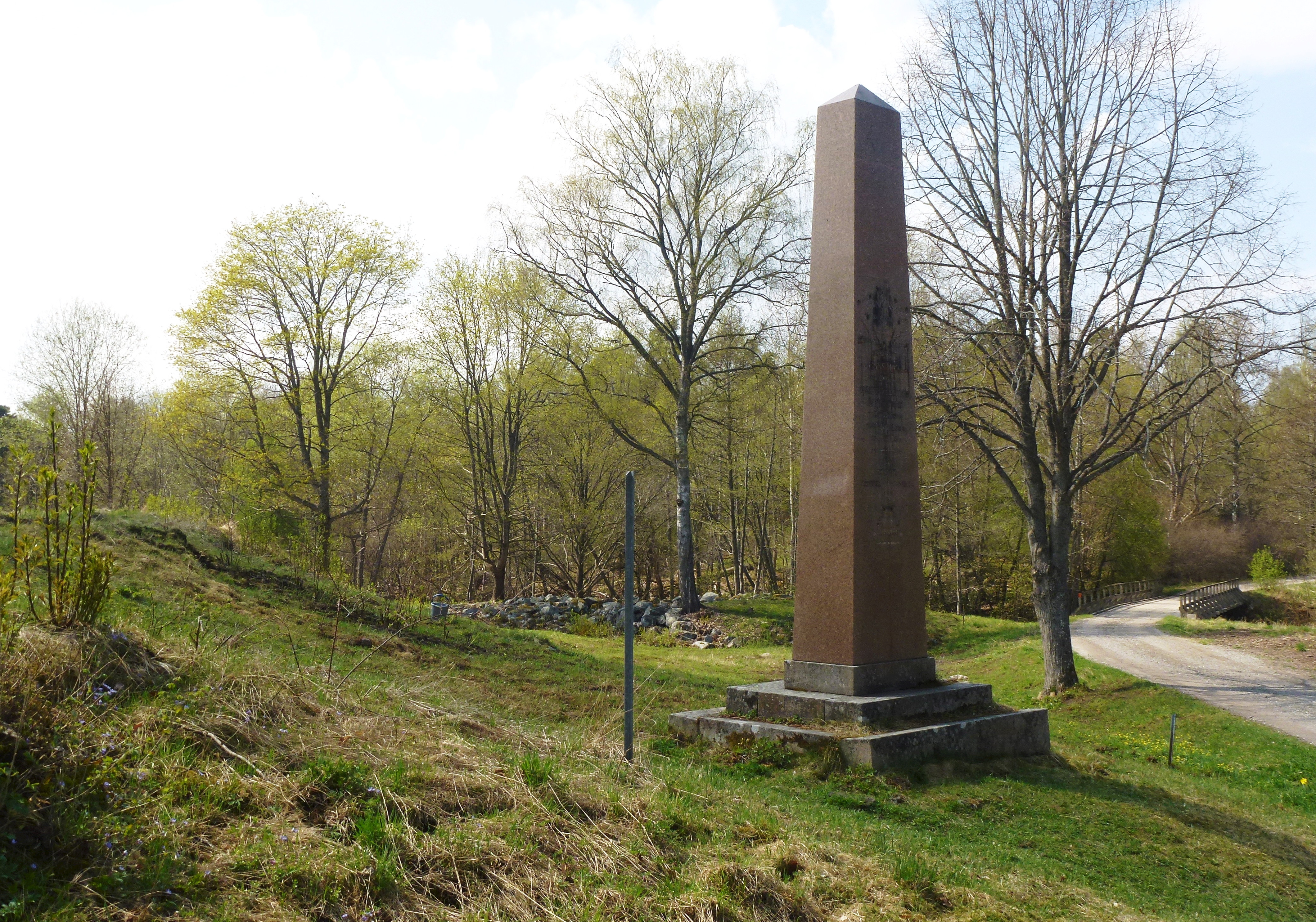 Stäket gamla vägbron obelisk med två inskriptioner: Den ursprungligatexten lyder: ”ÖFVER DENNA BRO SOM PÅ KONUNGENS ÖNSKAN 1804 BYGGDES AF GREFVE SAM AF UGGLAS FÄRDADES HANS MAIT MED EN ÄLSKAD GEMÅL OCH DOTTER FÖRSTA GÅNGEN VID ÅTERKOMSTEN FRÅN UTRIKES ORTER DEN 7 FEBRUARI 1805 MINNET AF TROGNA UNDERSÅTERS GLÄDJE AT ÅTERSE SIN ÖFVERHET FÖRVARAS PÅ DENNA STEN.” Den nya texten lyder: ”FÖR BEQVÄMLIGARE ÖFVERFART BYGGDES DENNA BRO ÅR 1804 AF GREFVE SAMUEL AF UGGLAS.”